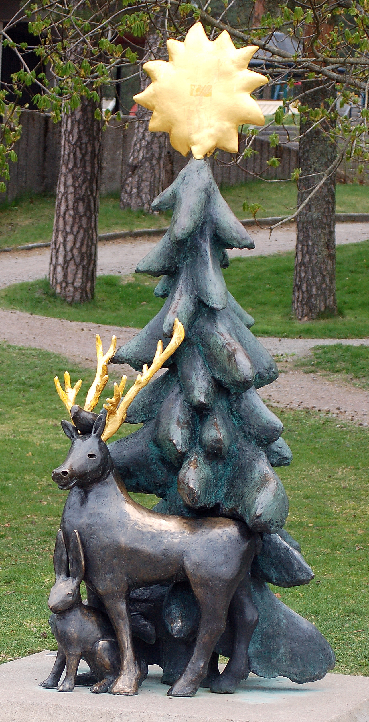 "Under solen" av Klara Kristalova 2006 brons placerad i Mariebergsskogens lekträdgård Karlstad.